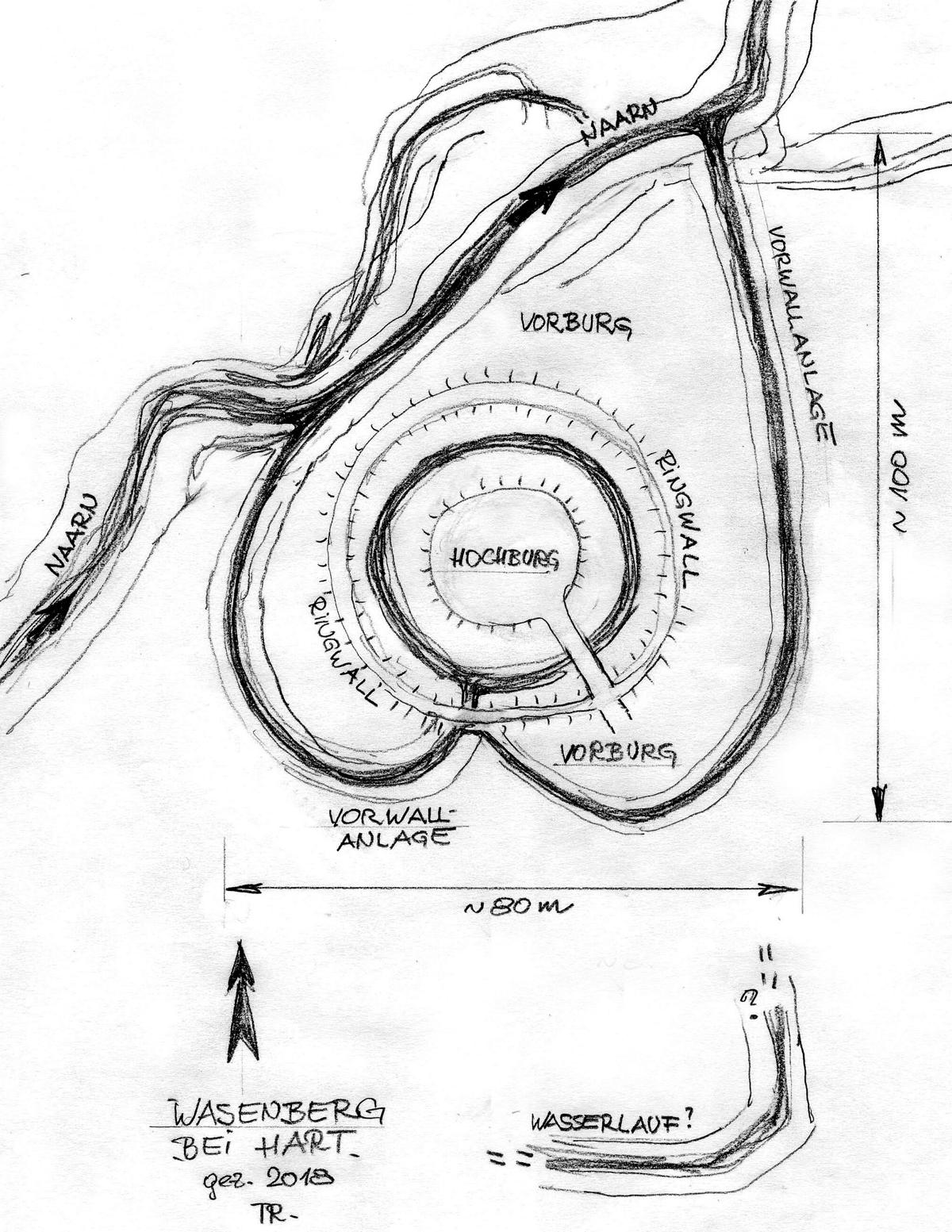 Wasenberg bei Hart in Gemeinde Mitterkirchen (Oberösterreich). Planskizze nach einem Geländefoto. 2018. Inklusive Vorburgbereich.